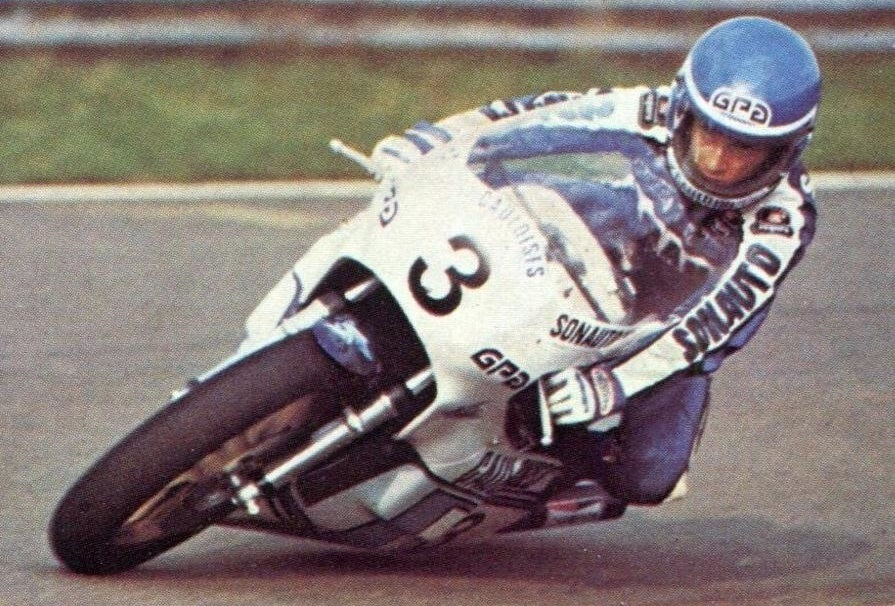 Christian Sarron (1979), 'Moto Sport 79', Panini figurina n°140.